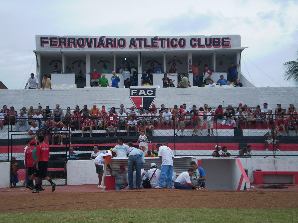 Estádio Elzir Cabral. Fortaleza, Ceará, Brasil.